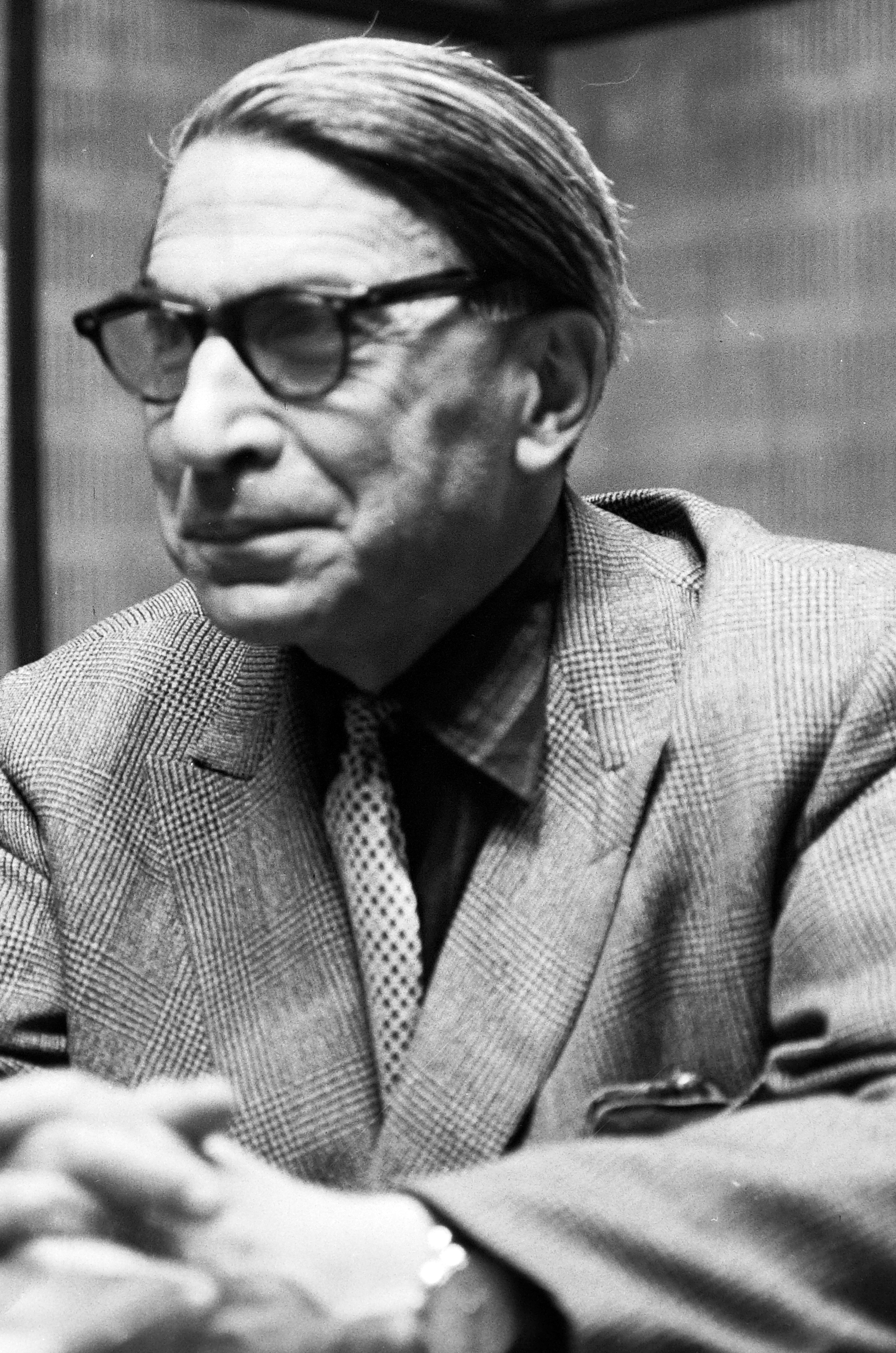 Kozma József (Joseph Kosma) magyar zeneszerző.